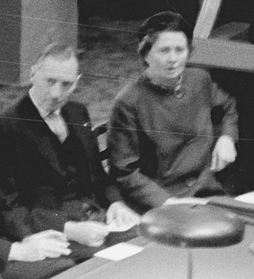 Collectie / Archief : Fotocollectie Anefo Reportage / Serie : [ onbekend ] Beschrijving : Viering van 500 jaar Staten-Generaal in januari 1964 in de vergaderzaal van de Eerste Kamer. Achter de regeringstafel v.l.n.r. Pollema (CHU), Van Riel (VVD), Van Lieshout (KVP), griffier Röell, H.M. de Koningin, senaatsvoorzitter Jonkman, Kranenburg (griffier internationale delegaties), Vos (PvdA), Berghuis (ARP) en Van Ommeren-Averink (CPN). Datum : 9 januari 1964 Locatie : Den Haag Trefwoorden : jubilea, parlementariërs, parlementen, plechtigheden Fotograaf : Nijs, Jac. de / Anefo Auteursrechthebbende : Nationaal Archief Materiaalsoort : Negatief (zwart/wit) Nummer archiefinventaris : bekijk toegang 2.24.01.05 Bestanddeelnummer : 915-9265